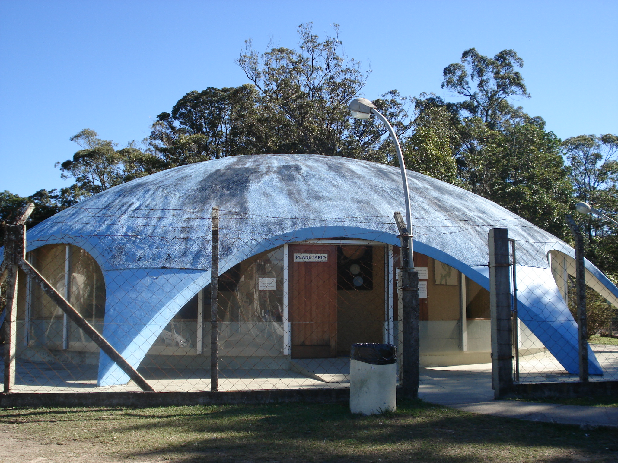 O Planetário da Universidade Federal de Santa Catarina, no Campus Trindade.